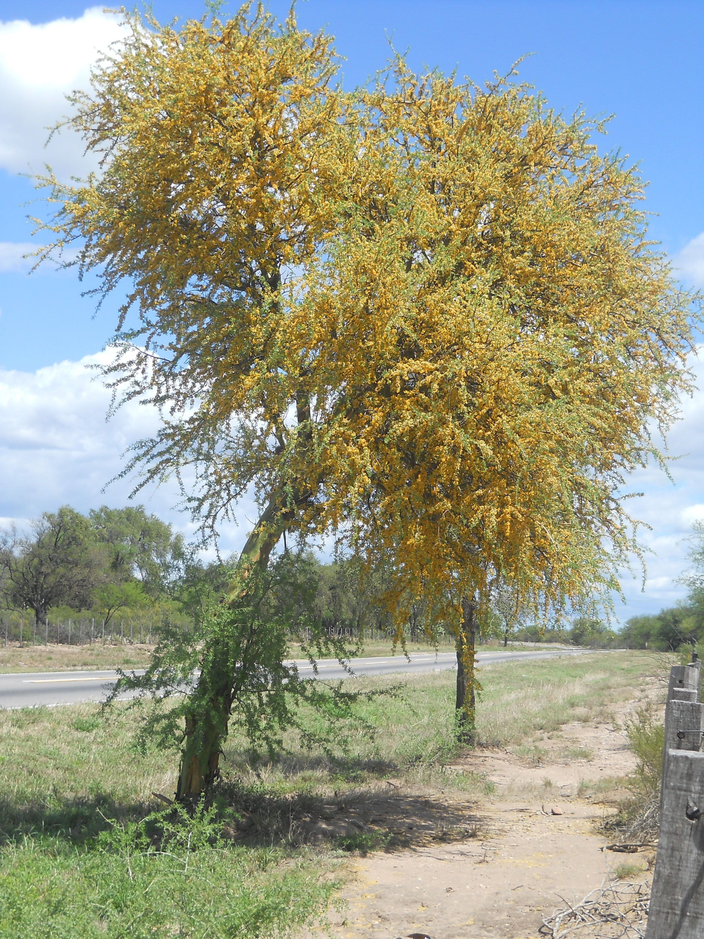 Excelente ejemplar de Chañar